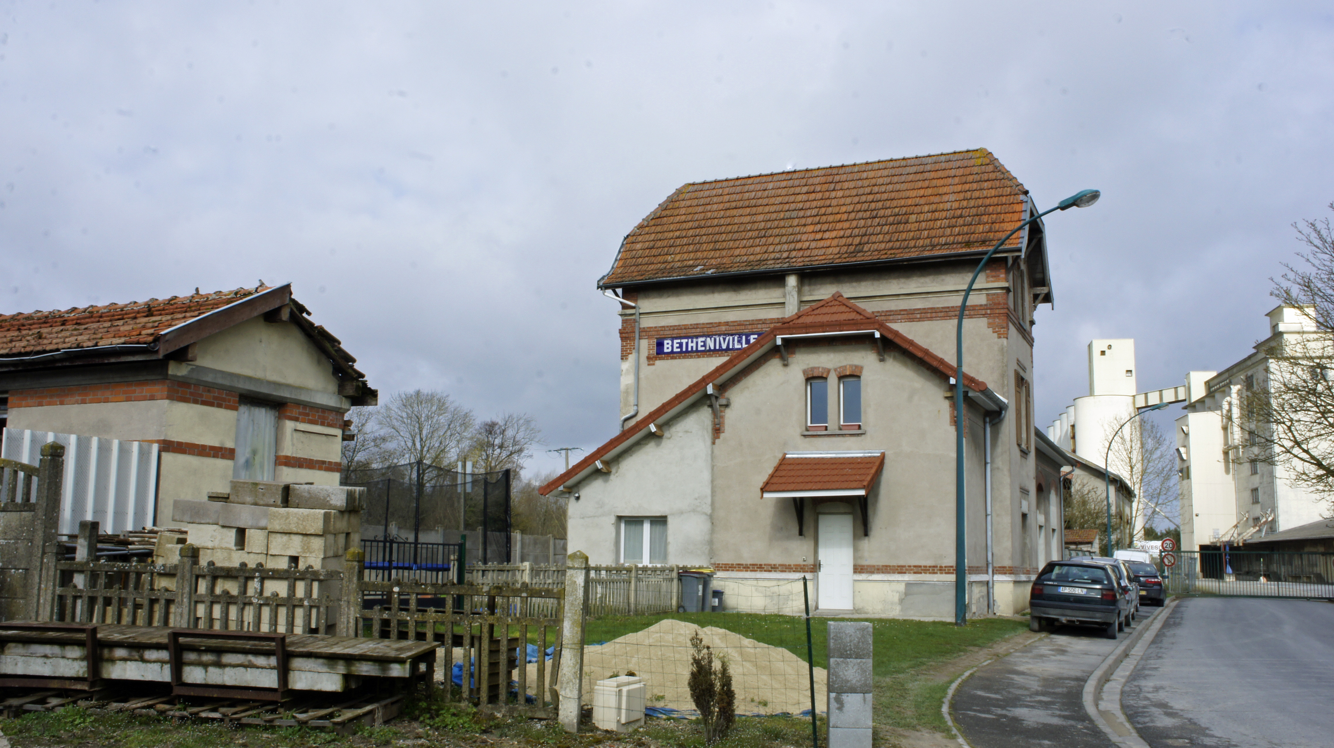 Le bâtiment de la gare à Bétheniville .